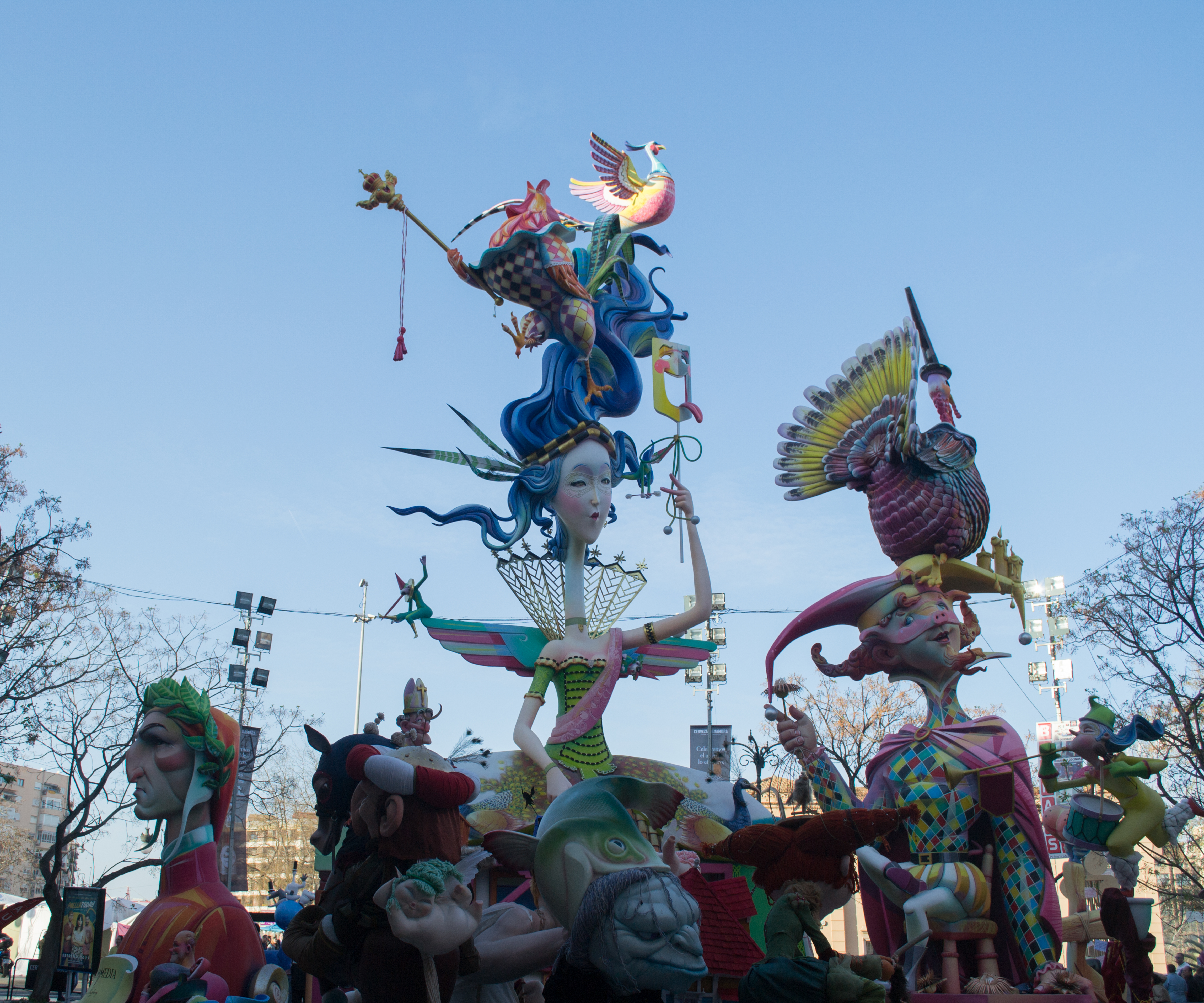 Falla Na Jordana.